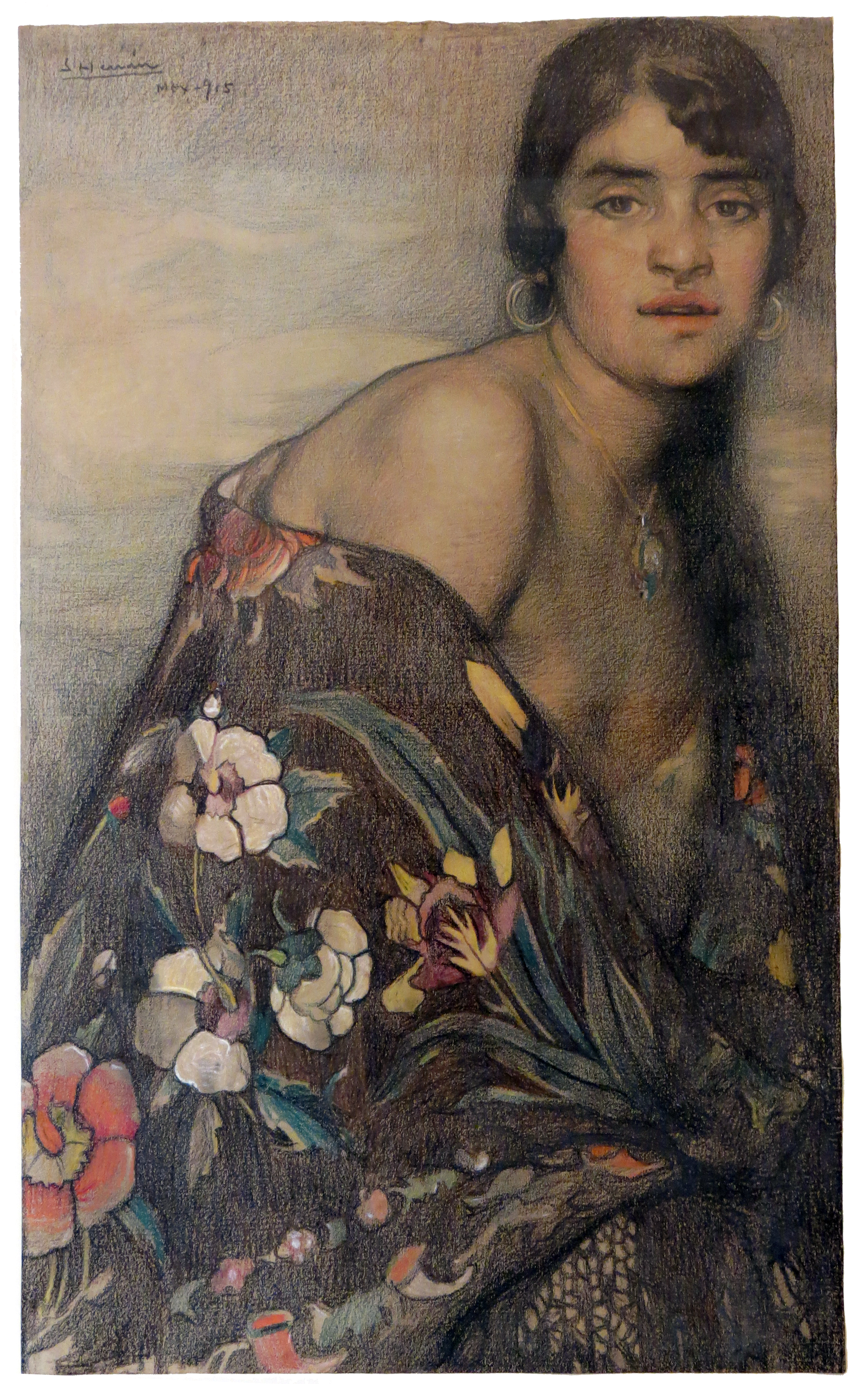 Una de las obras más características del pintor aguascalentense, Saturnino Herrán. Esta obra se encuentra en el Museo de Aguascalientes.